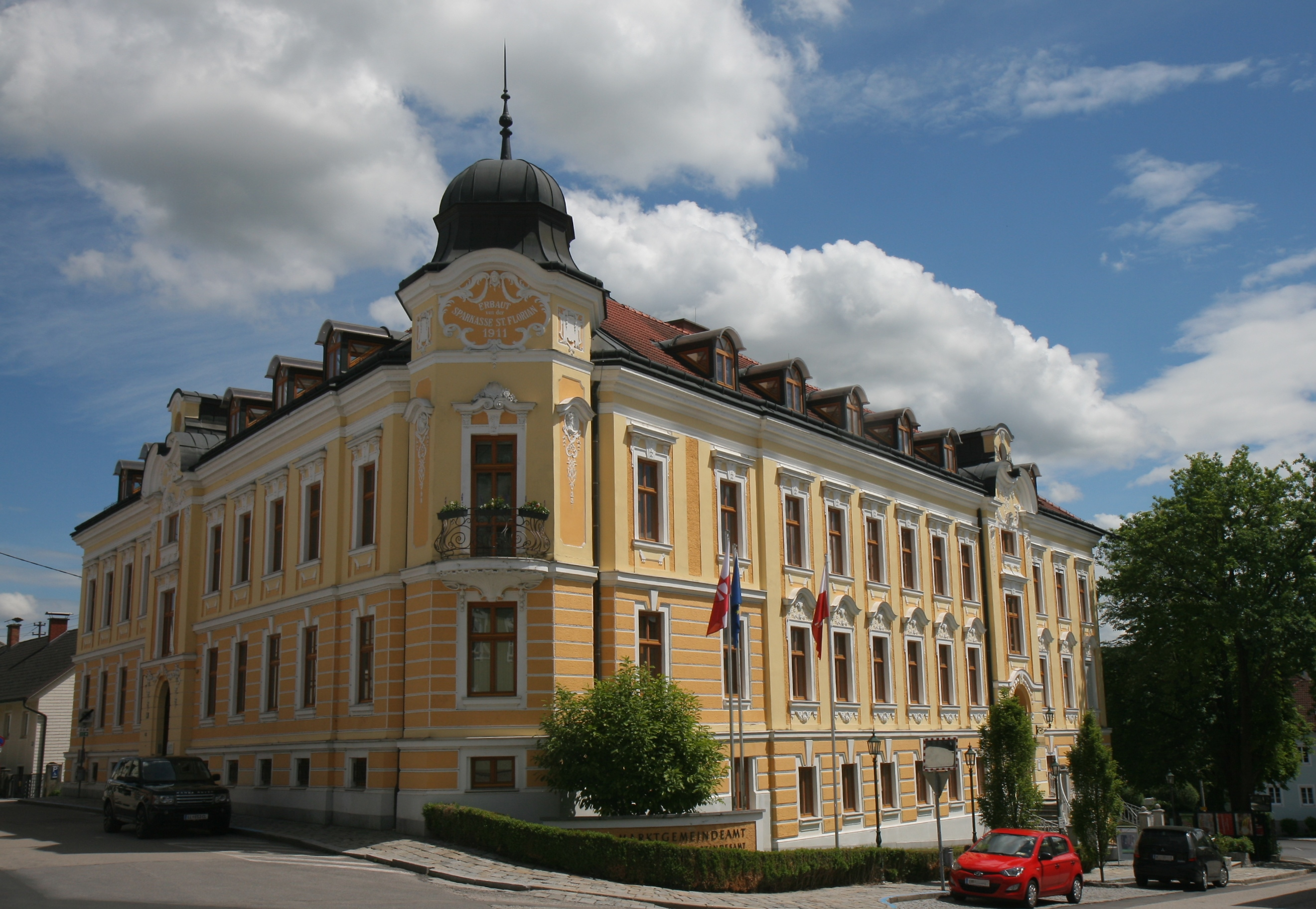 Rathaus (Marktgemeindeamt und Standesamt), Leopold-Kotzmann-Straße 1, St. Florian.